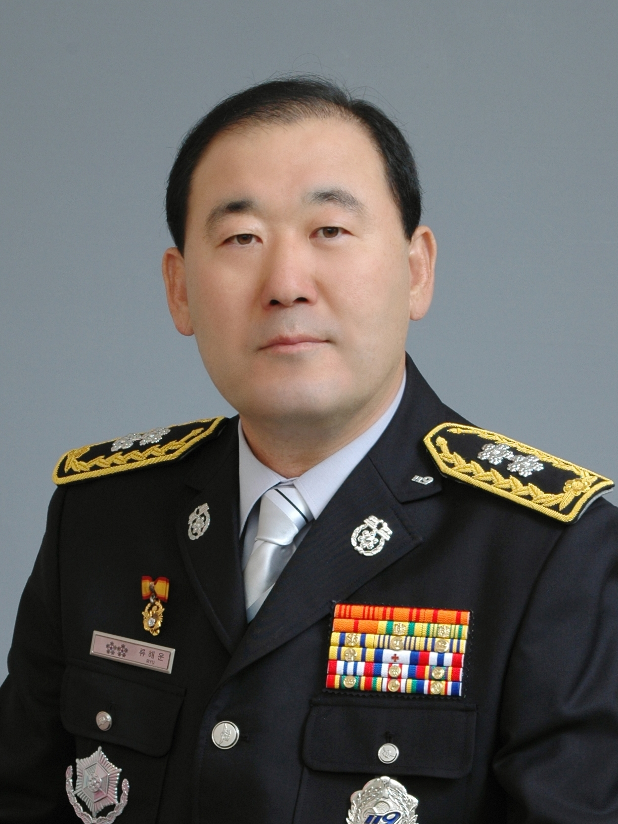 제26대 부산소방안전본부 본부장 류해운 증명사진